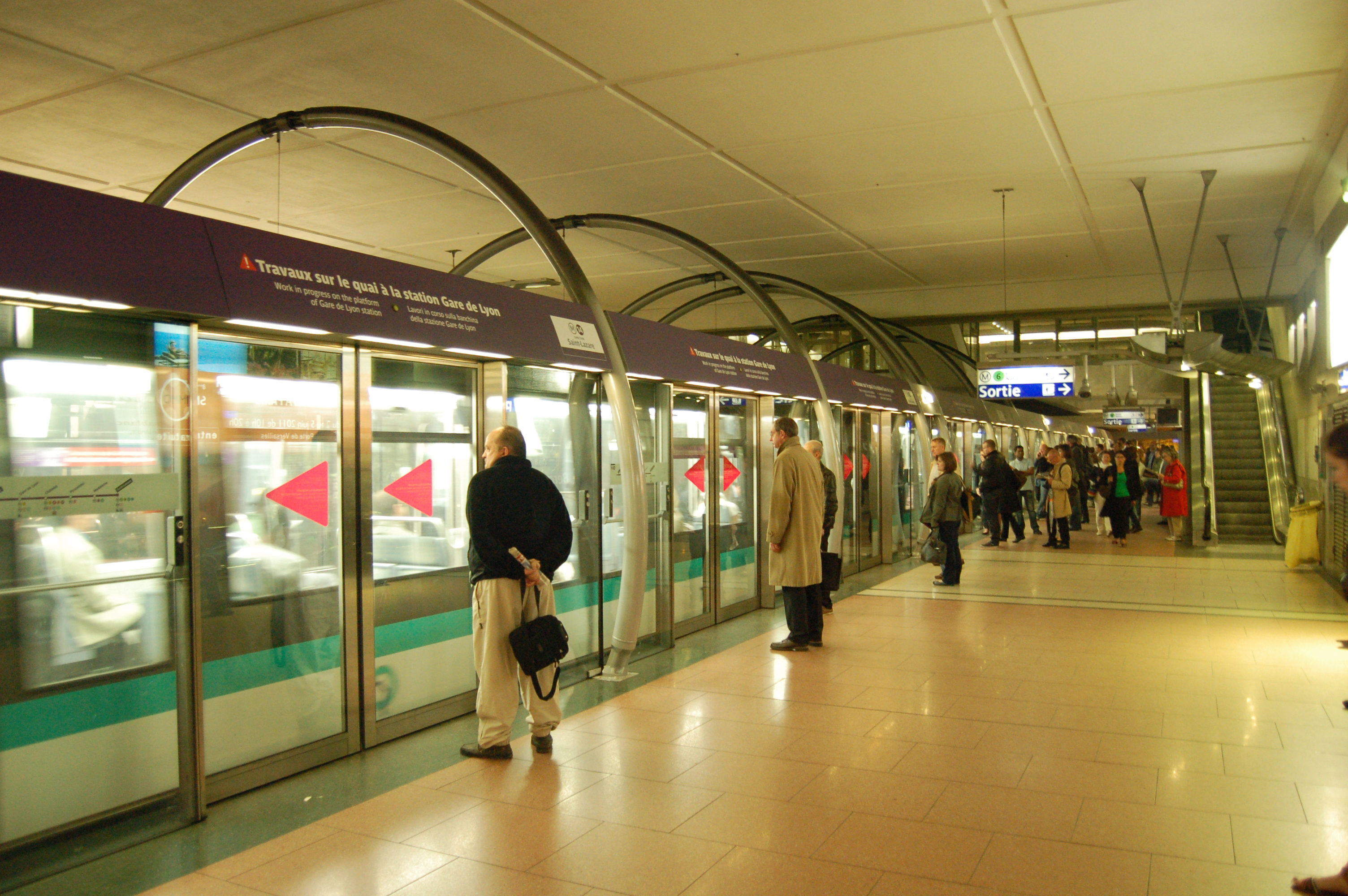 Quai de la station Bercy de la Ligne 14 du métro de Paris, France.